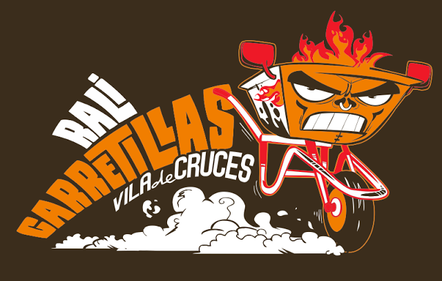 Diseño que portan las camisetas del Rali de Carretillas